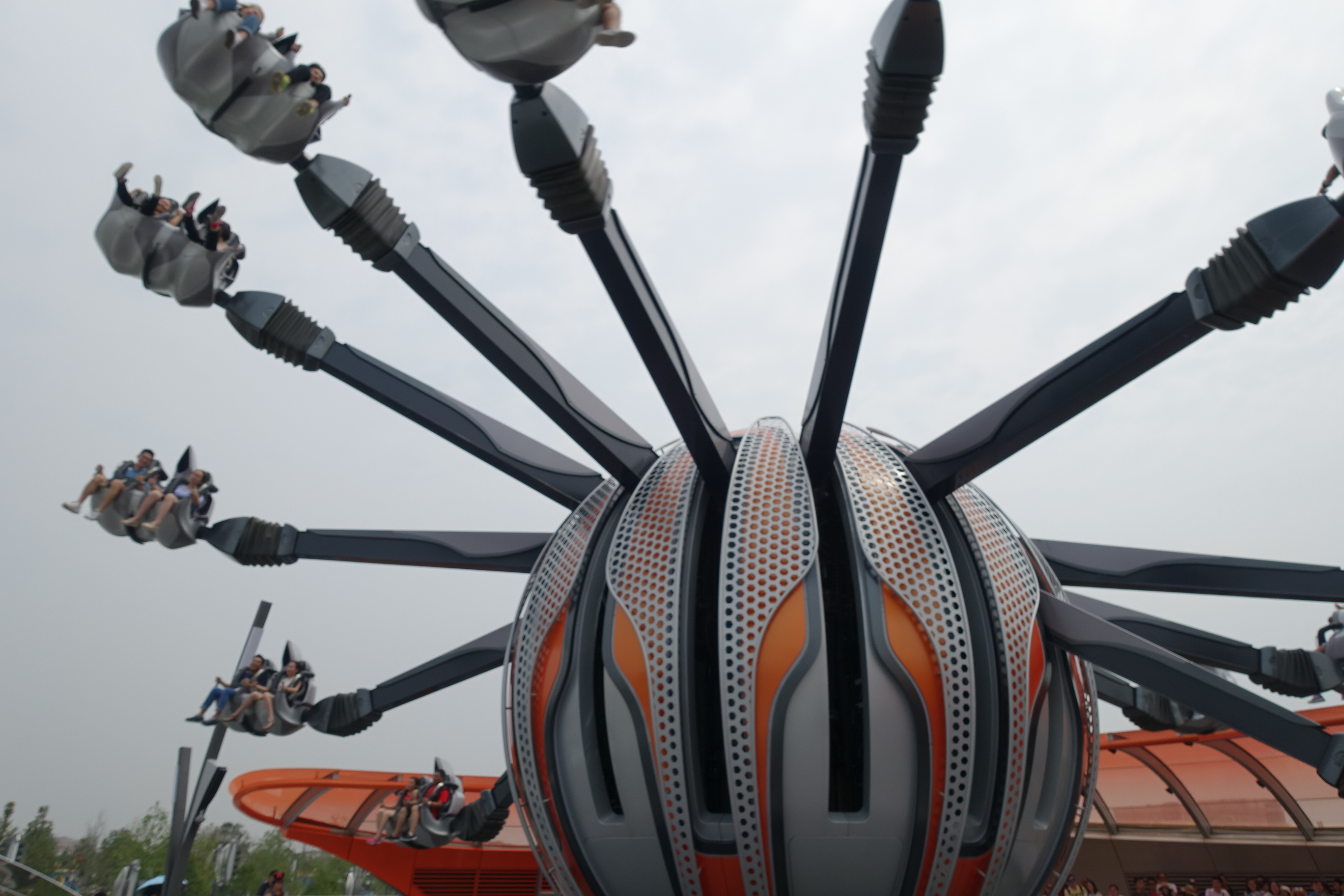 Jet Packs